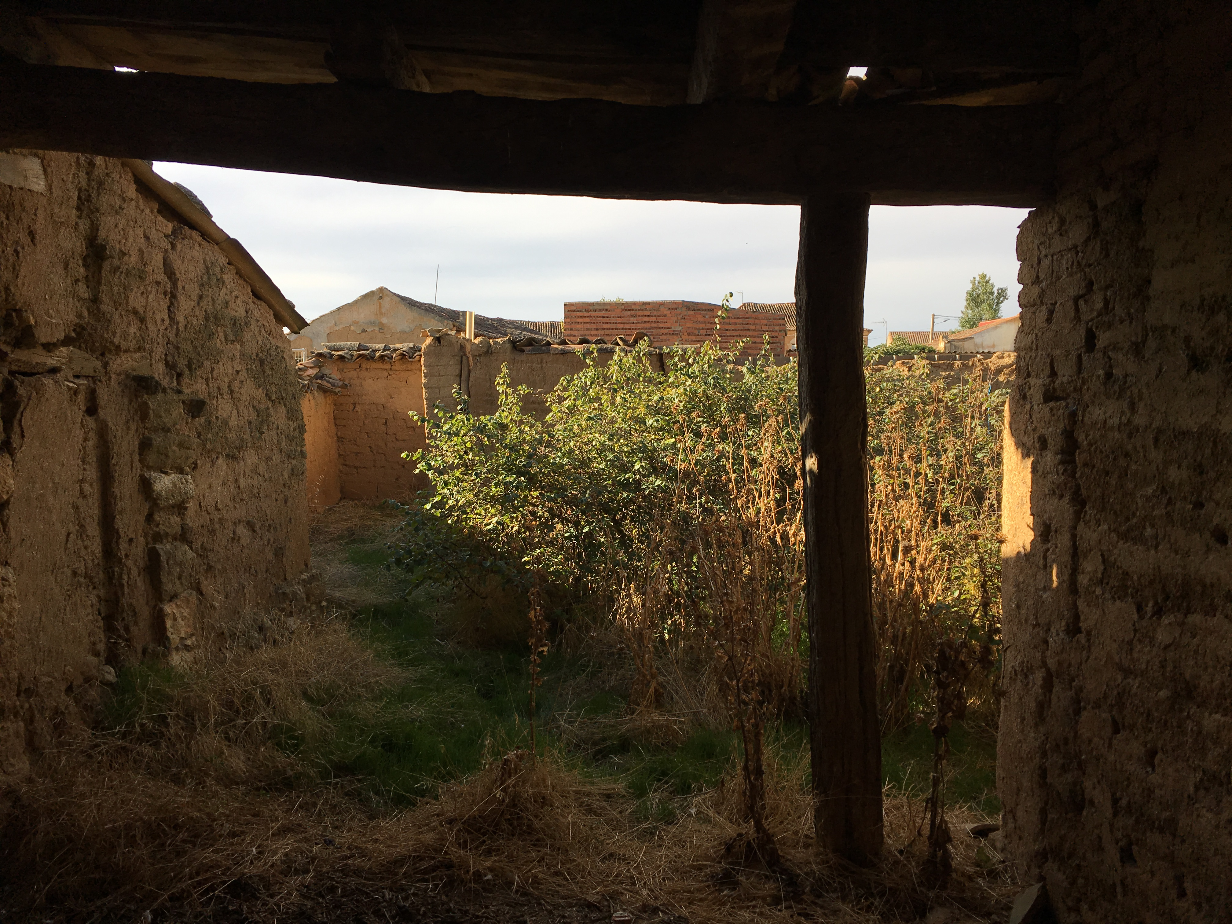 Villaesper Milenario